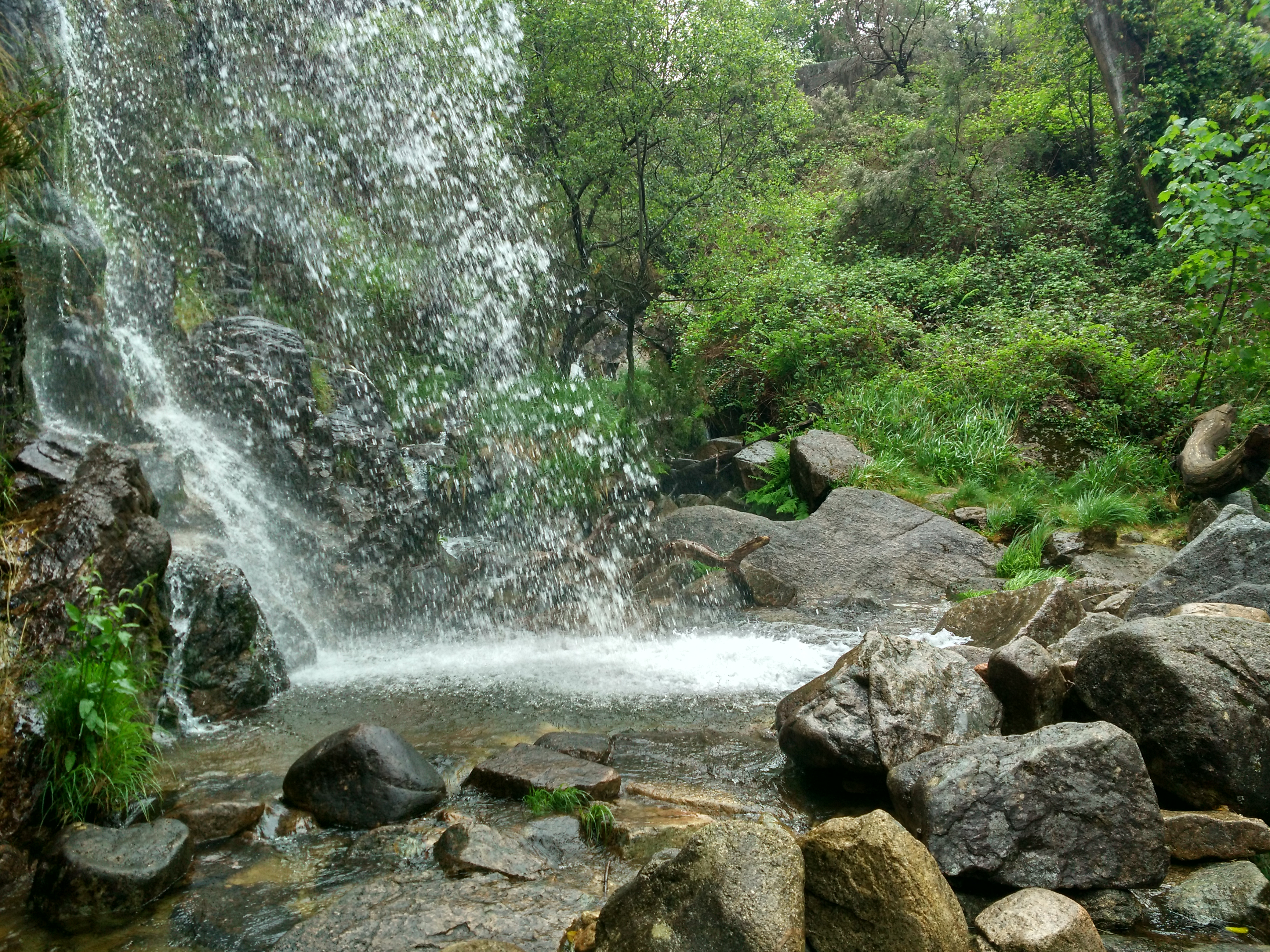 Cascata de Leonte no Parque Nacional da Peneda Gerês. Faz parte do trilho da Preguiça. This is a photography of a Site of Community Importance in Portugal with the ID: Peneda / Gerês. / Gerês Natura2000 entry, / Gerês EEA entry